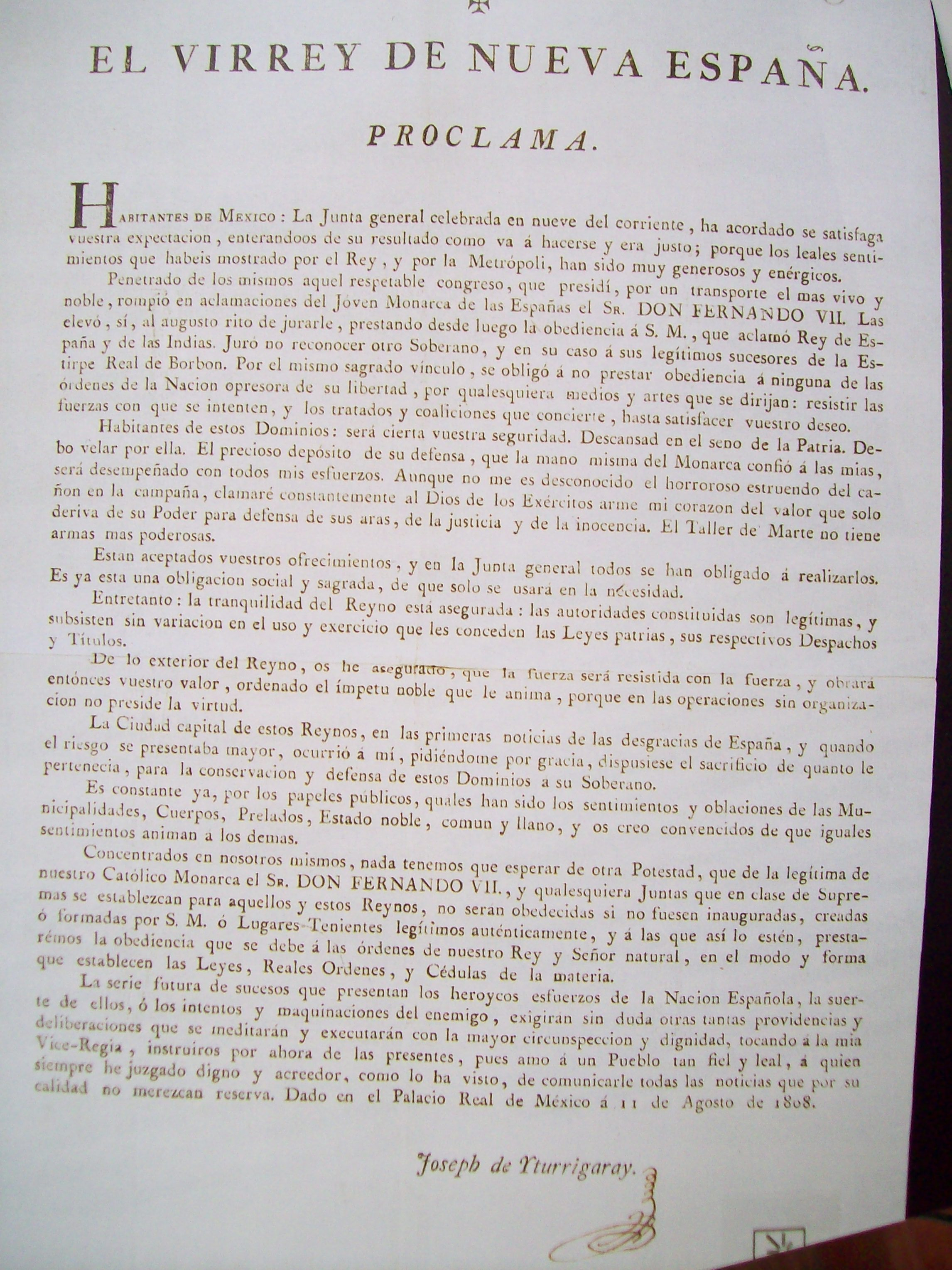 Proclama del virrey José de Iturrigaray del 11 de agosto de 1808. Archivo General de la Nación de México. Fuente: Memoria de las revoluciones de México. (2009) ISBN 978-607-7748-04-5